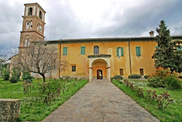 Abbazia benedettina di Santa Maria della Neve a Torrechiara (Parma).